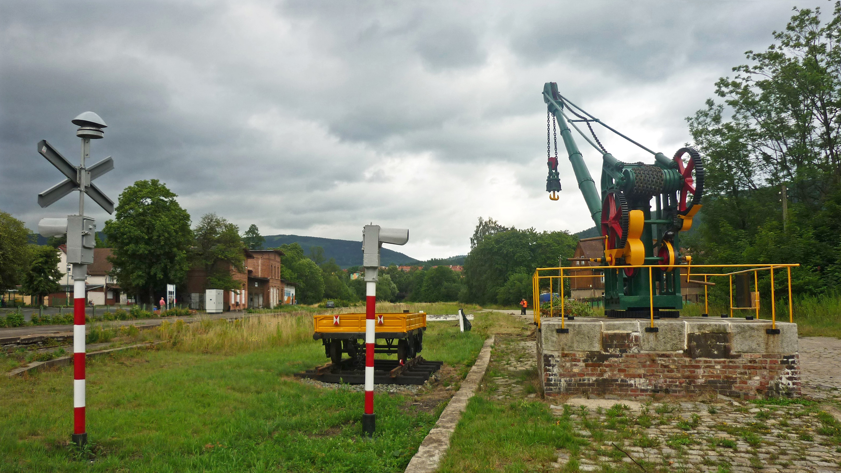 Bahnkran (1905) am ehem. Bahnhof Schmiedeberg (Rsgb) (Kowary) in Niederschlesien